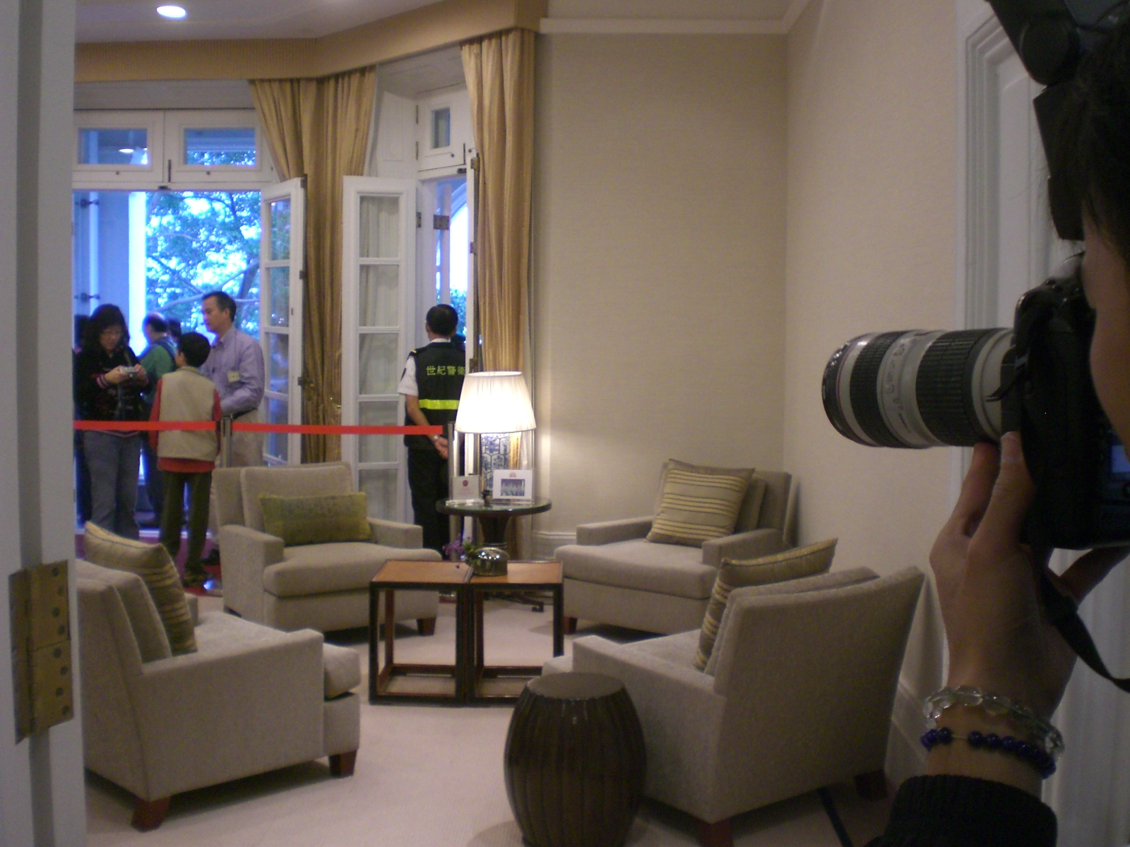 前任行政長官辦公室, 堅尼地道, 28 Kennedy Road, Hong Kong